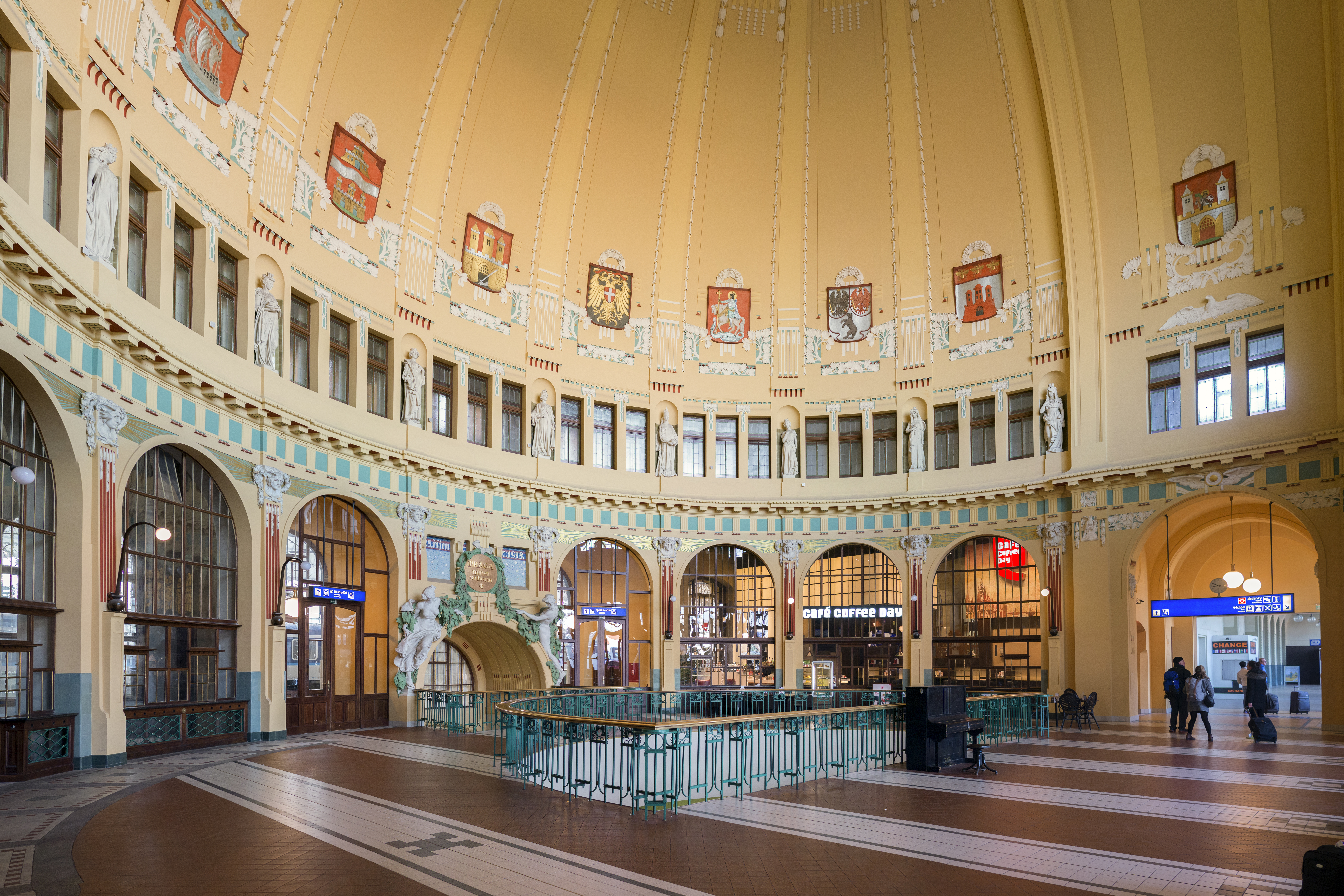 Prag Jugendstil Hauptbahnhof